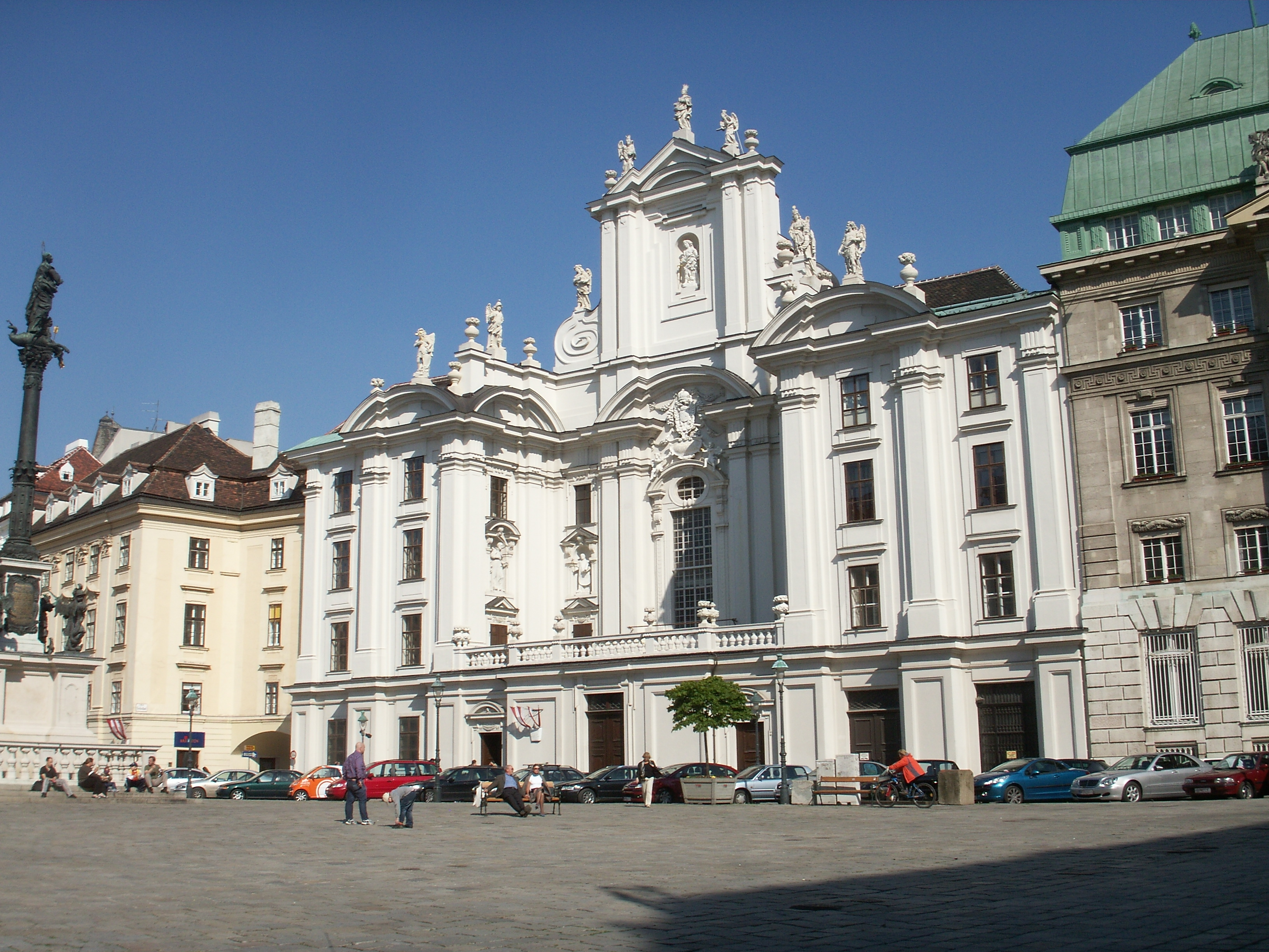 Kirche am Hof